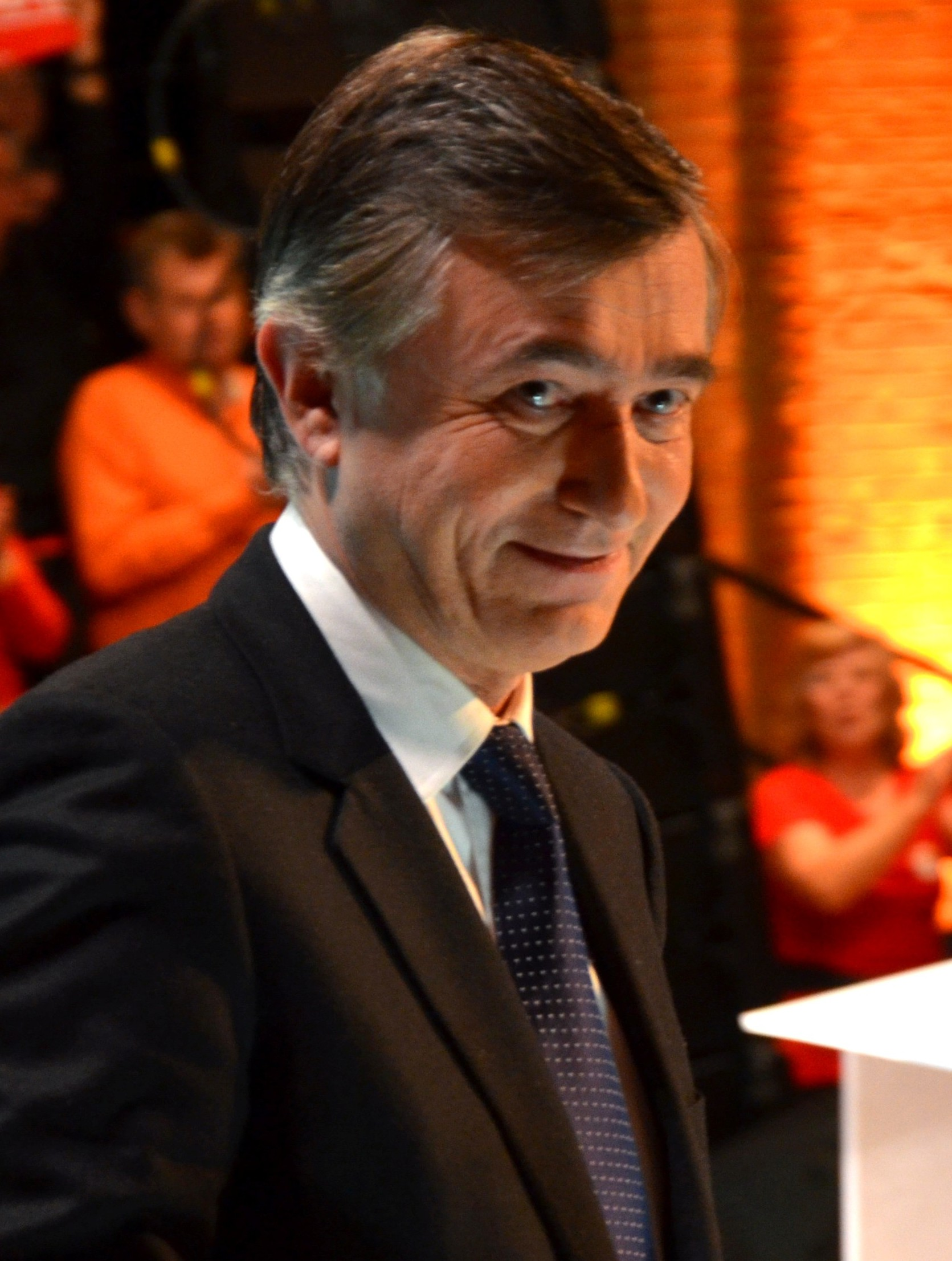 Philippe Douste-Blazy au meeting de François Bayrou à Toulouse.